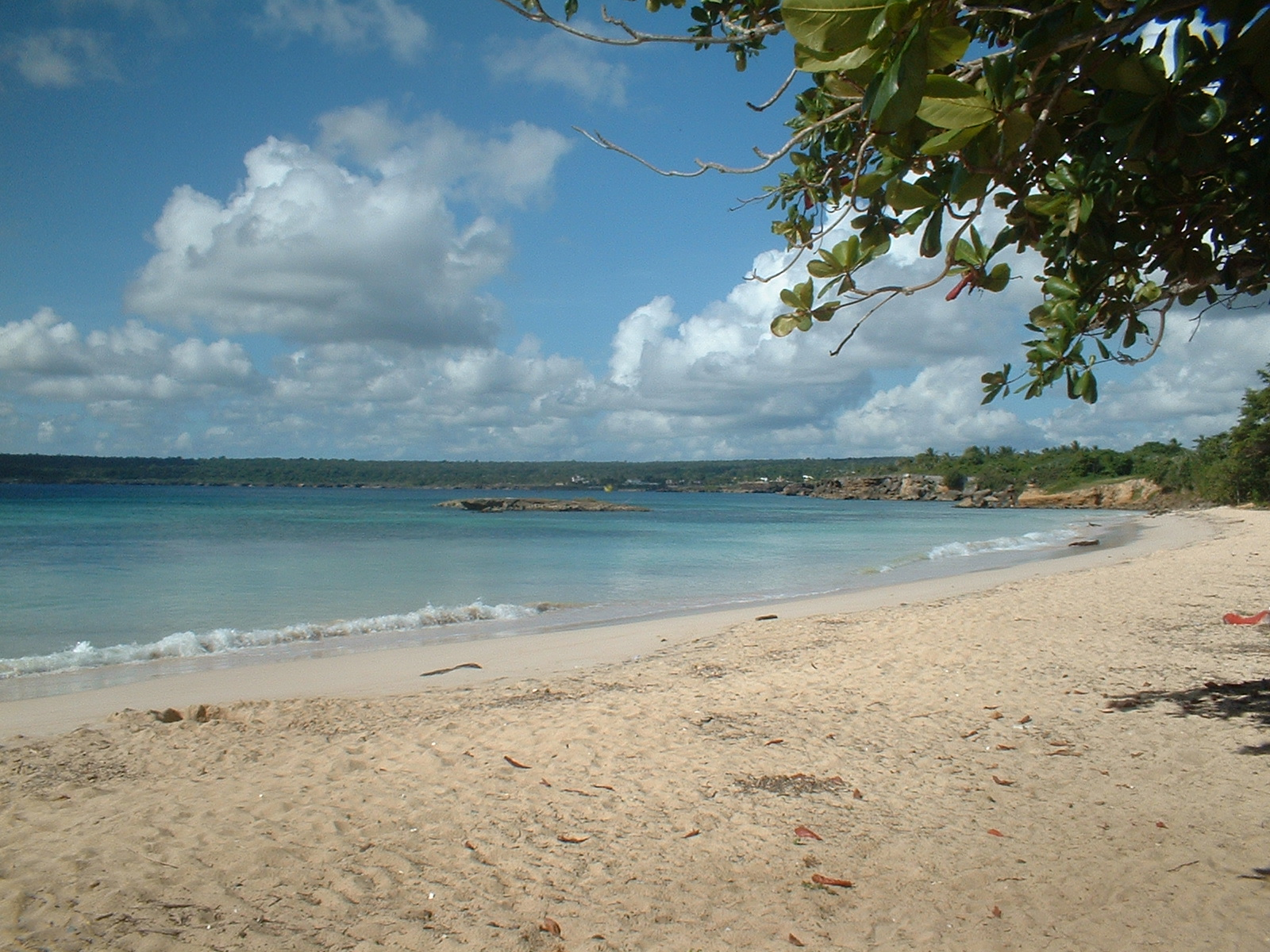 La plage de Boca de Yuma